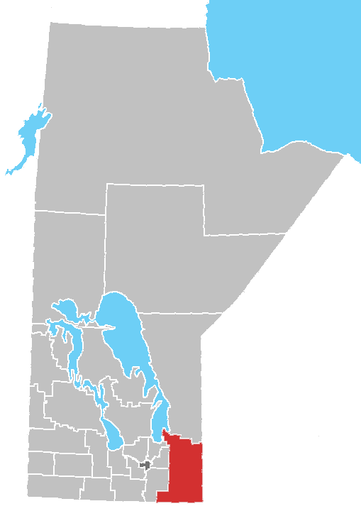 Manitoba census area No. 1